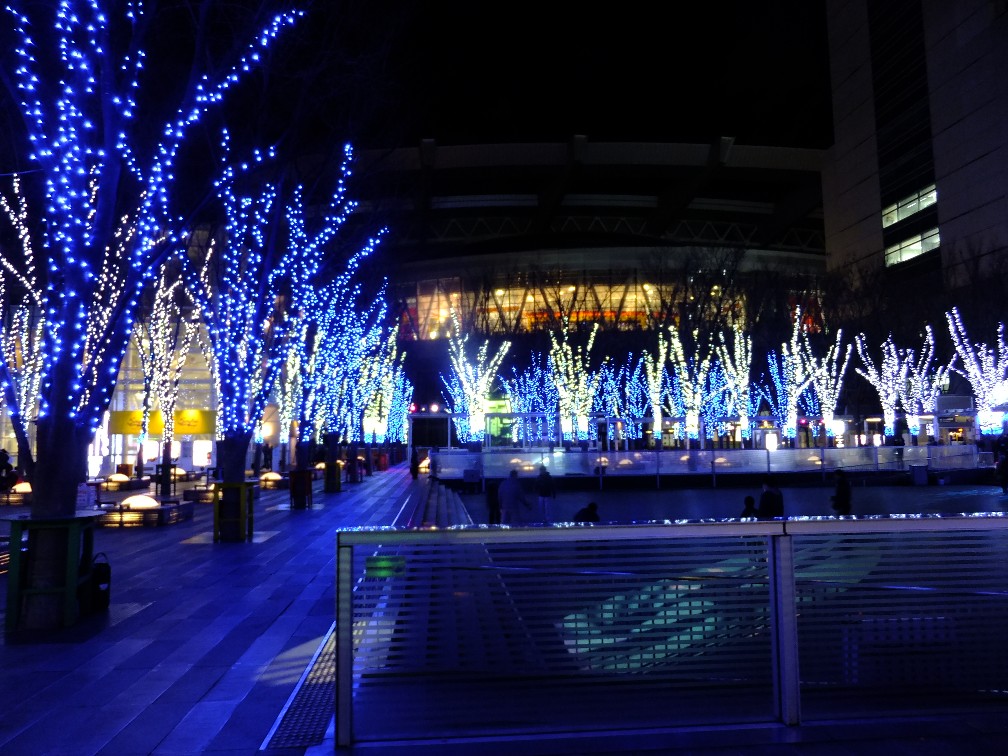 さいたま新都心・けやきひろばイルミネーション